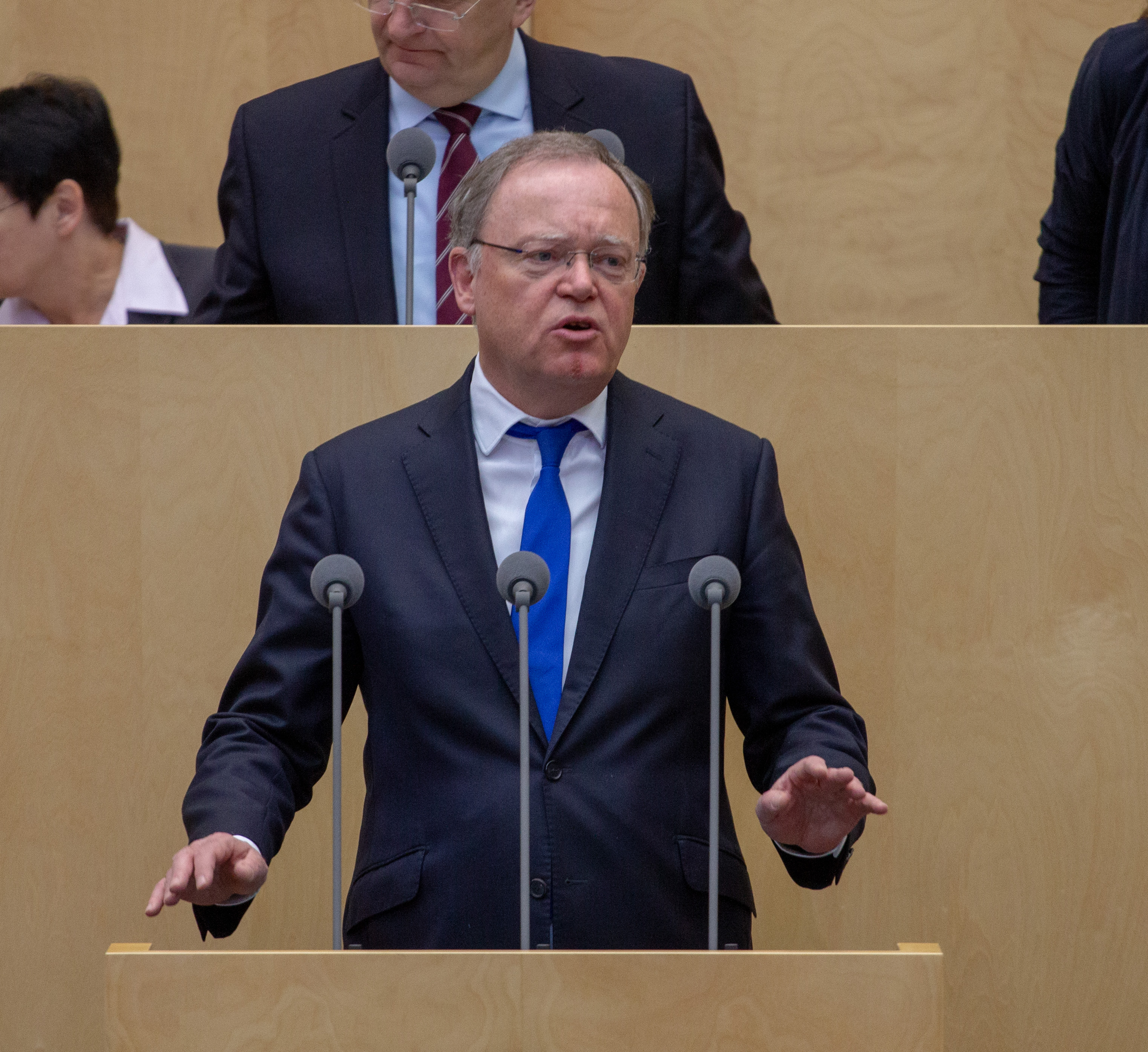 Plenarsitzung des Bundesrates am 12. April 2019 in Berlin.